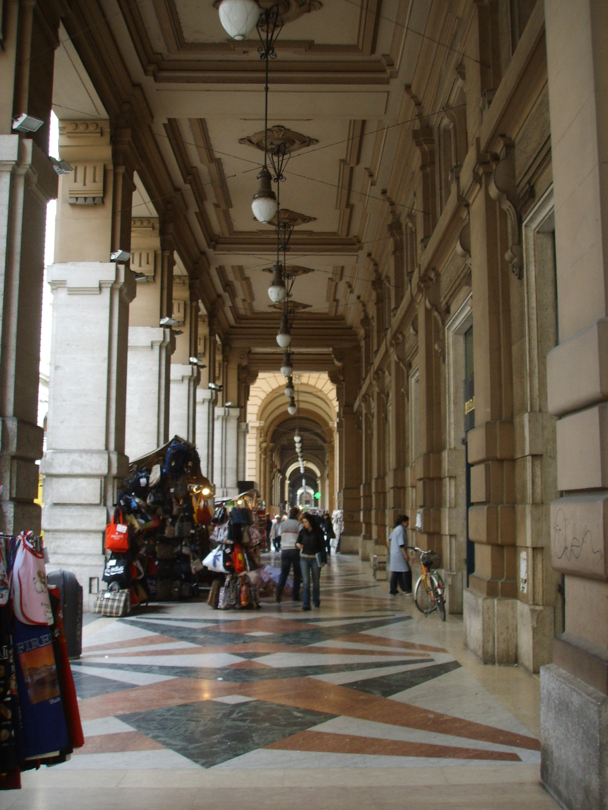 Palazzo pola e todescan porticato